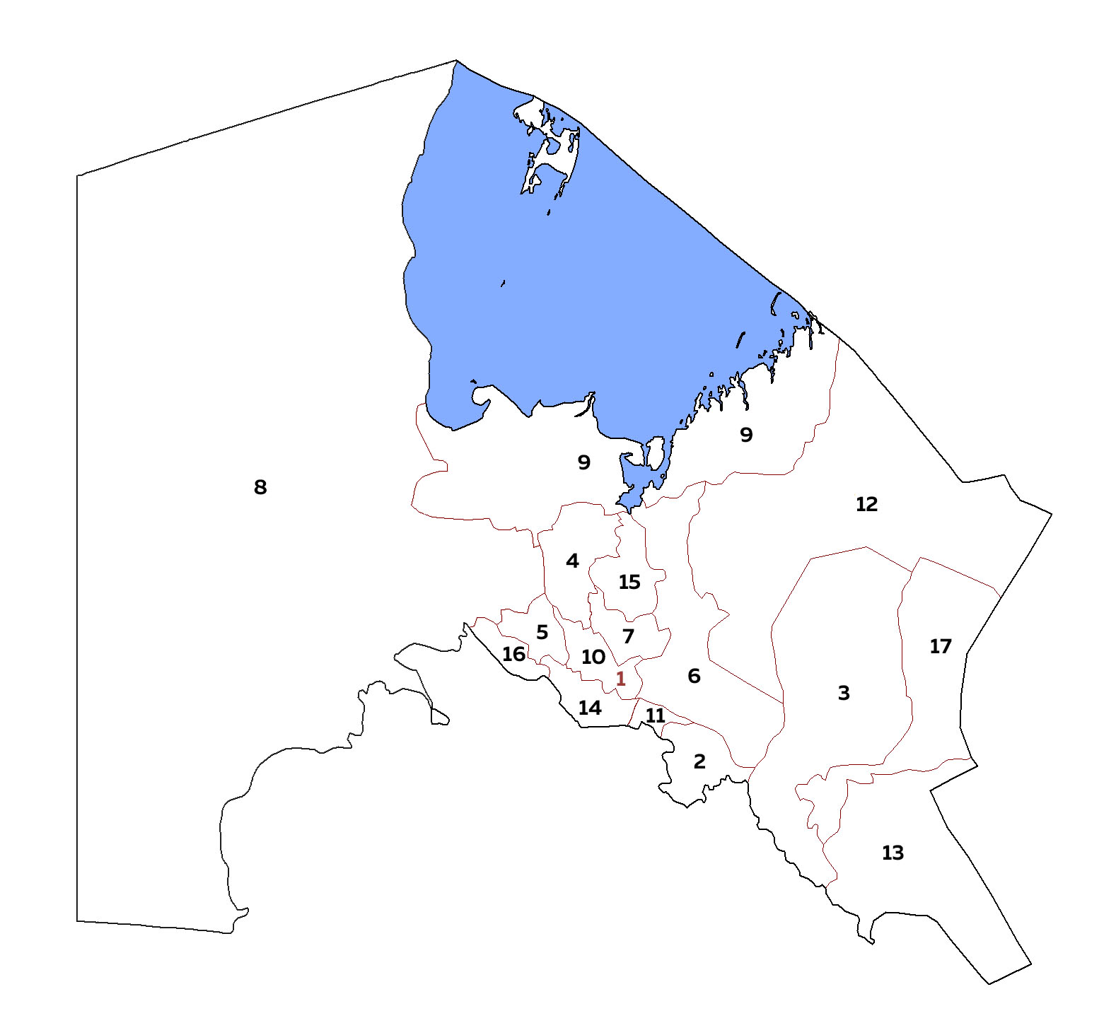 Административное деление Республики Каракалпакстан